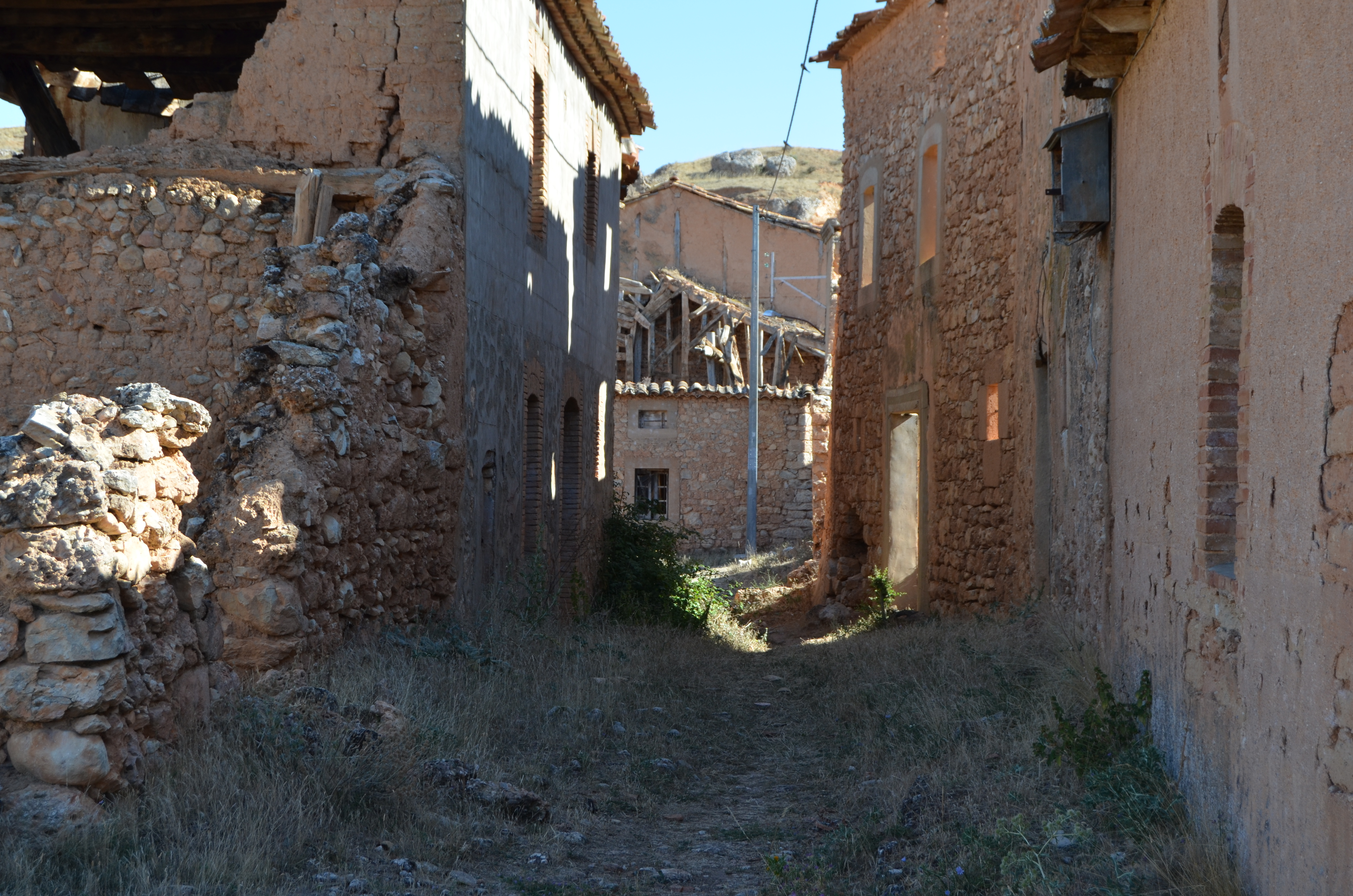 Estado actual de las calles y casas.